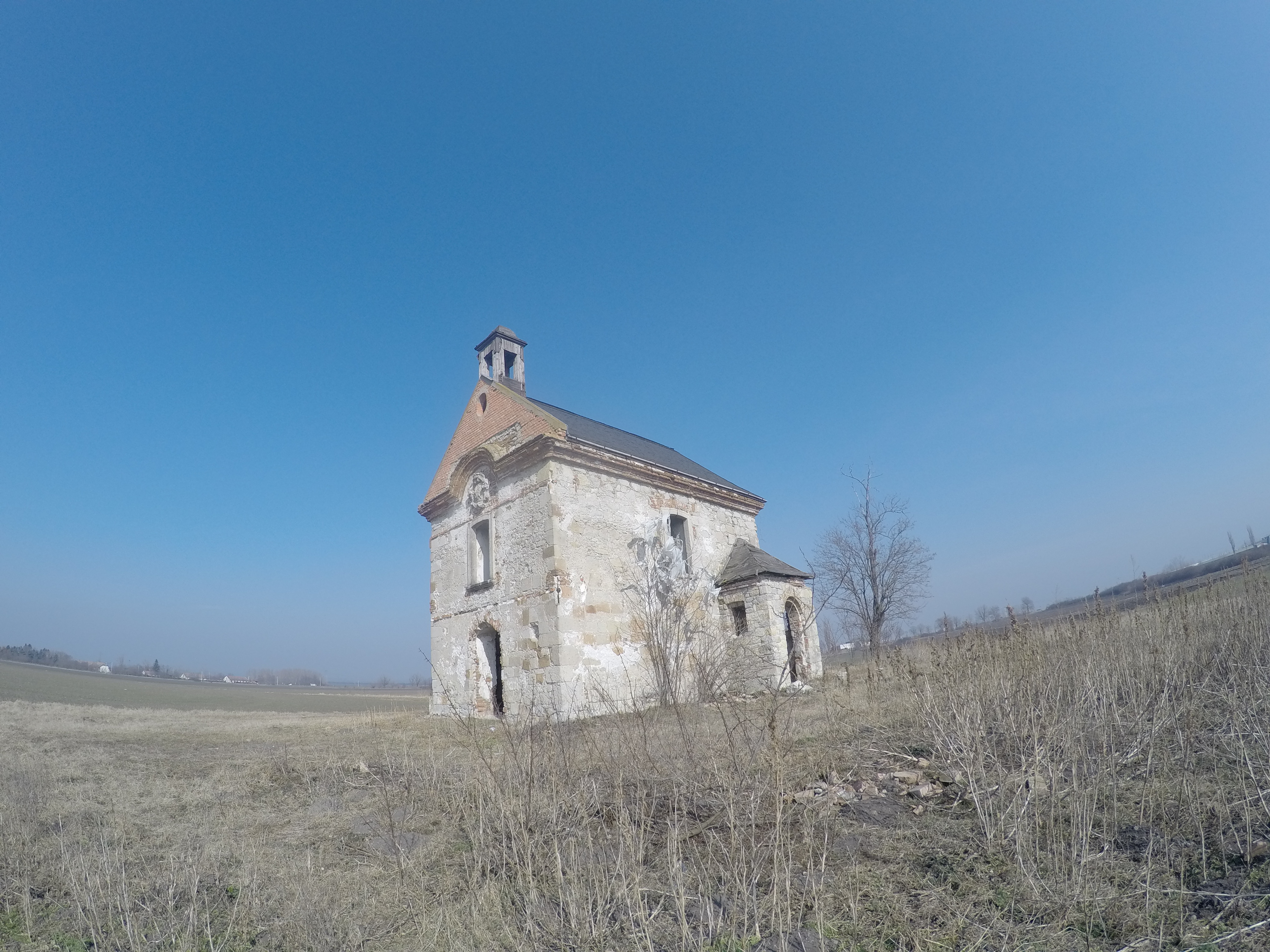 Füzesabony, Pusztaszikszó kápolnája délnyugatról fotózva.